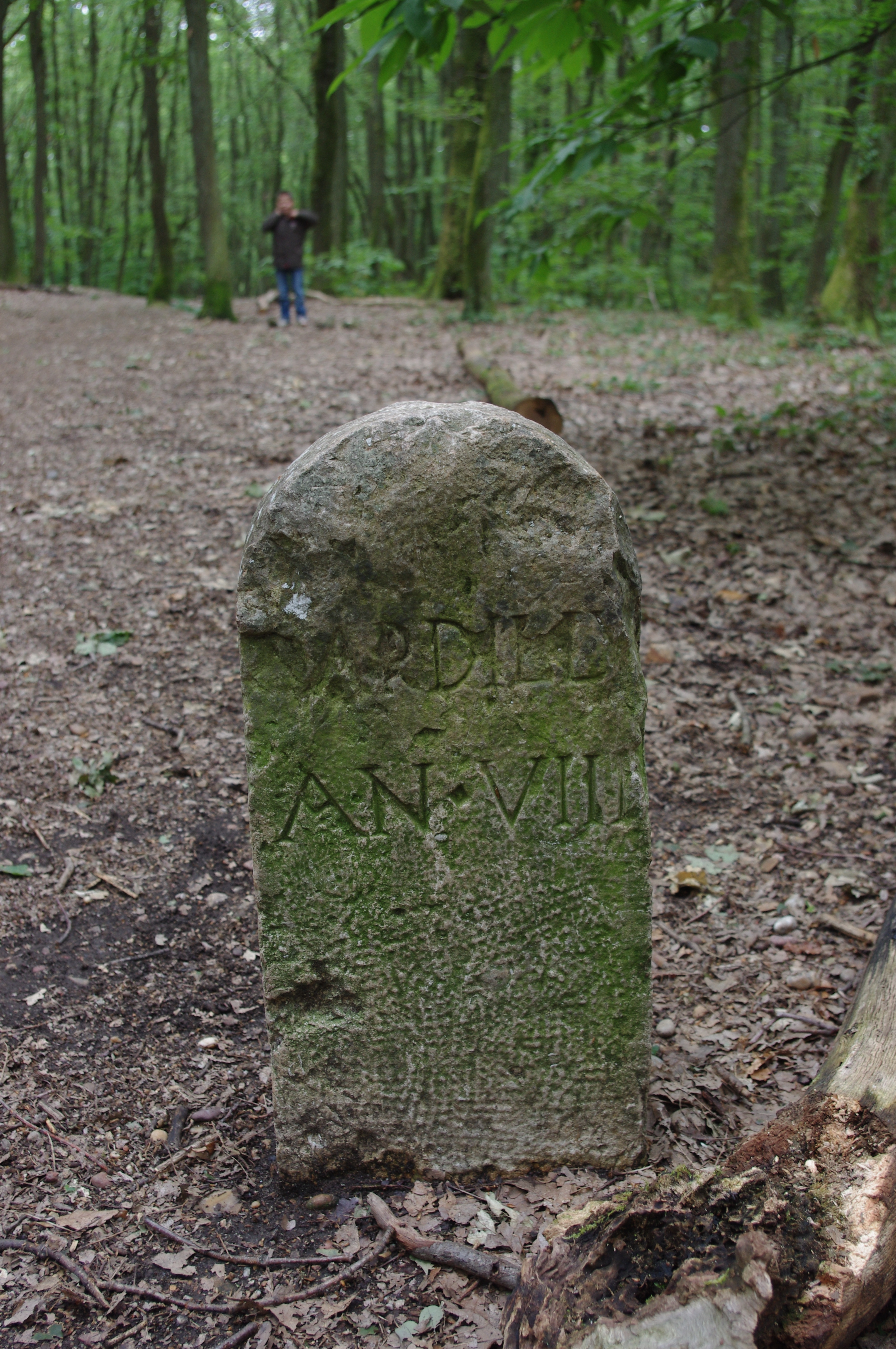 Borne marquant la limite entre la commune de Dardilly et sa voisine